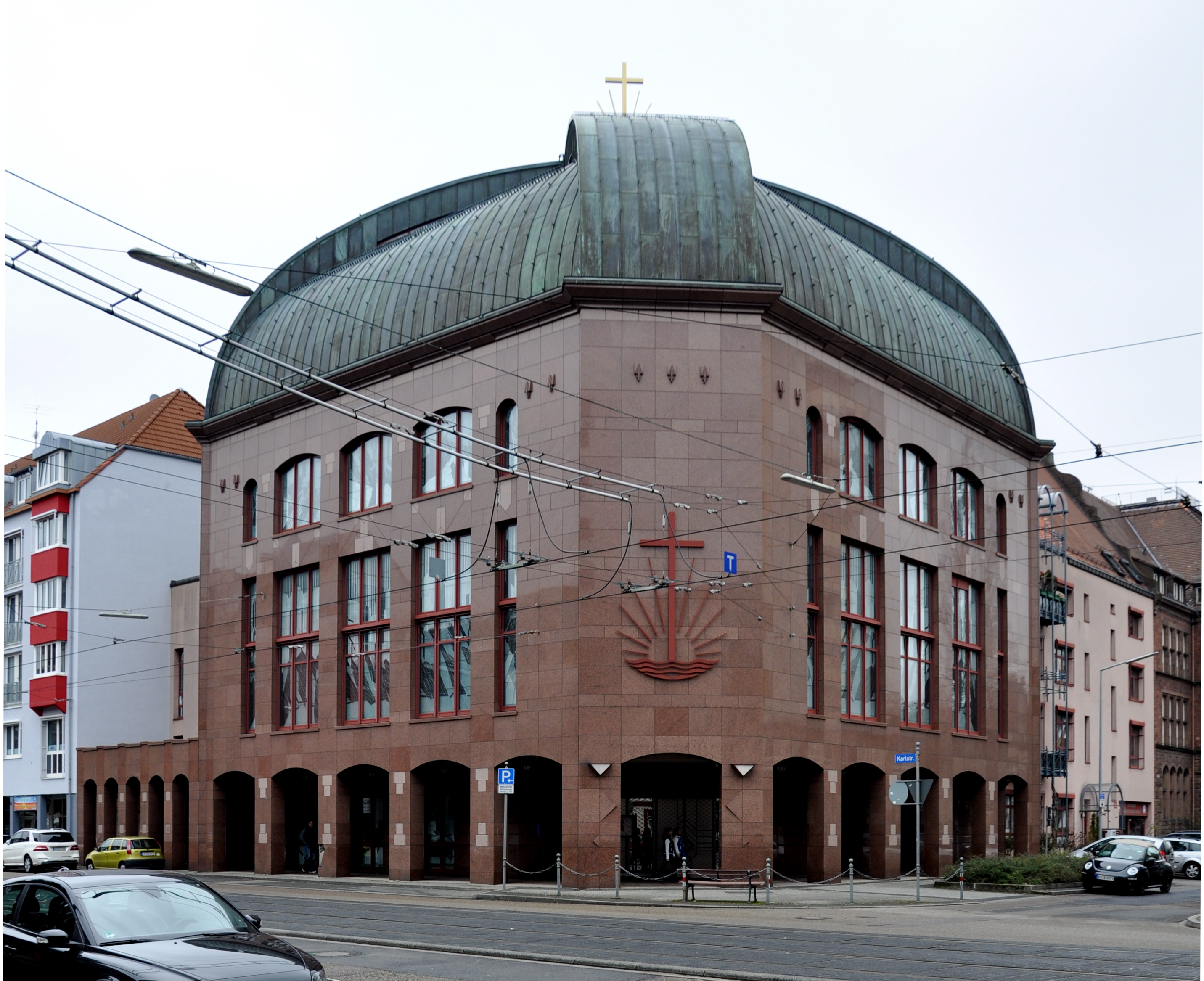 Karlsruhe, Neuapostolische Kirche Karlsruhe-Mitte in der Karlstraße